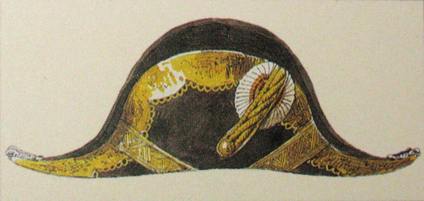 Парадная шляпа гражданских чинов для 1-го и 2-го классов с российской кокардой. Высочайше утверждено 18 апреля 1855 года.